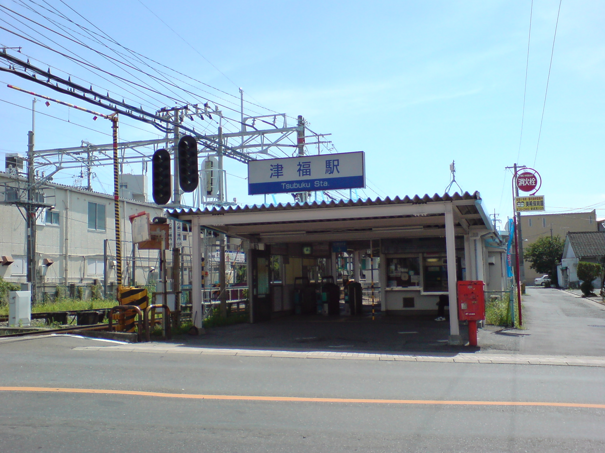 西鉄津福駅の駅舎